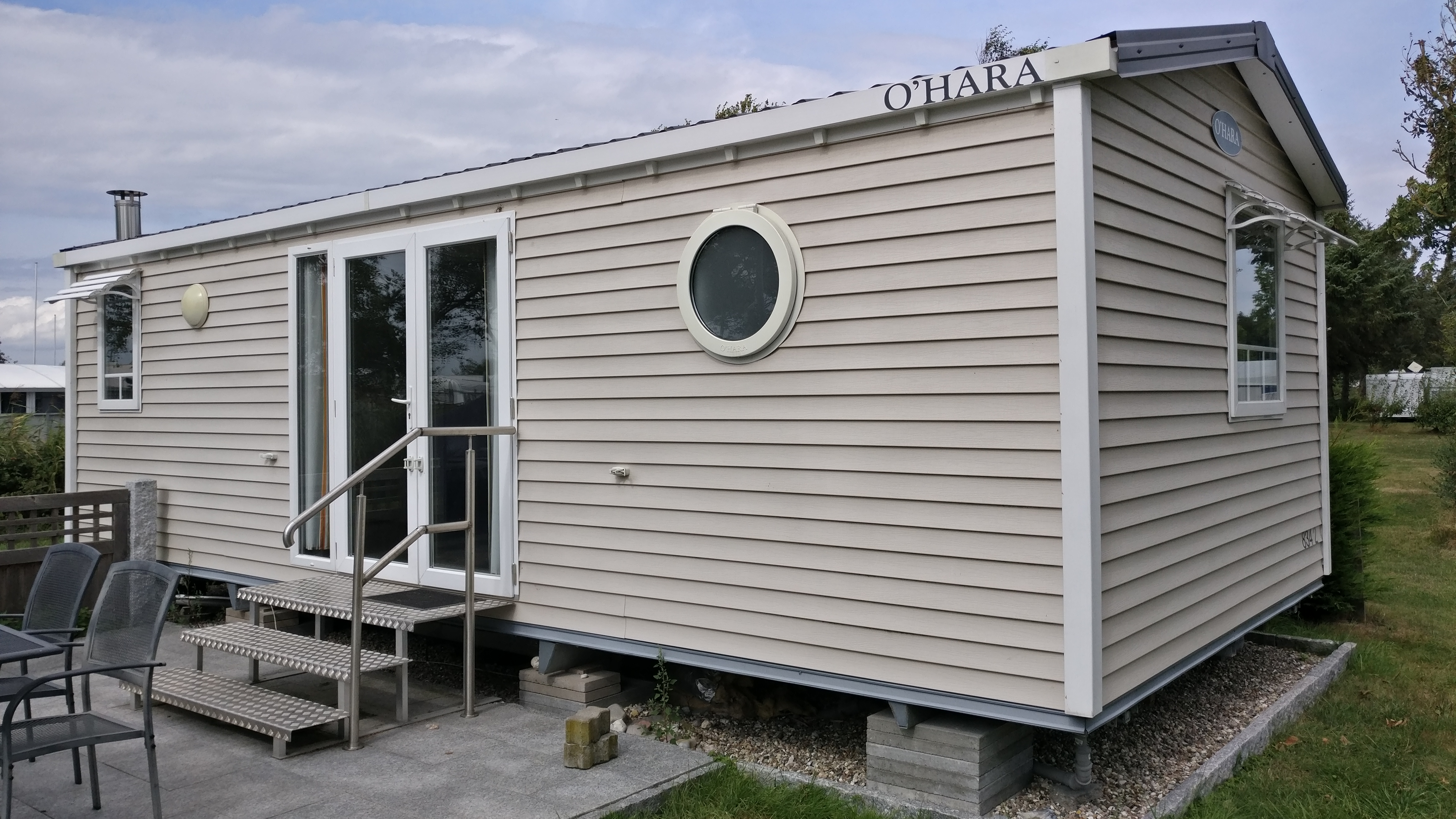 Mobilheim der französischen Firma O'Hara auf Fehmarn